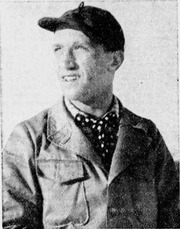 Avgust Jakopič.